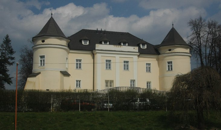 Čereňany, kaštieľ